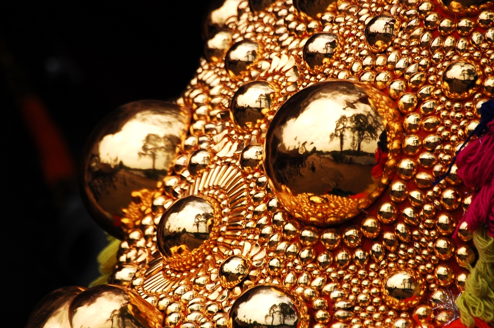 വട്ടക്കിണ്ണം